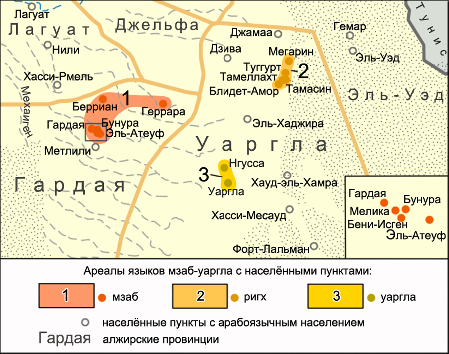 Карта распространения берберских языков мзаб-уаргла в Алжире. Источники: Global Mapping International. Steve Huffman Language Maps MultiTree:A Digital Library of Language Relationships. Tumzabt MultiTree:A Digital Library of Language Relationships. Tamazight, Temacine MultiTree:A Digital Library of Language Relationships. Tagargrent Ethnologue. Languages of Algeria, Morocco, Tunisia, Western Sahara Ethnologue.Tumzabt. A language of Algeria Ethnologue. Tamazight, Temacine. A language of Algeria Ethnologue. Tagargrent. A language of Algeria